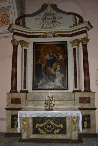 Autel du Rosaire, retable et toile du Rosaire.